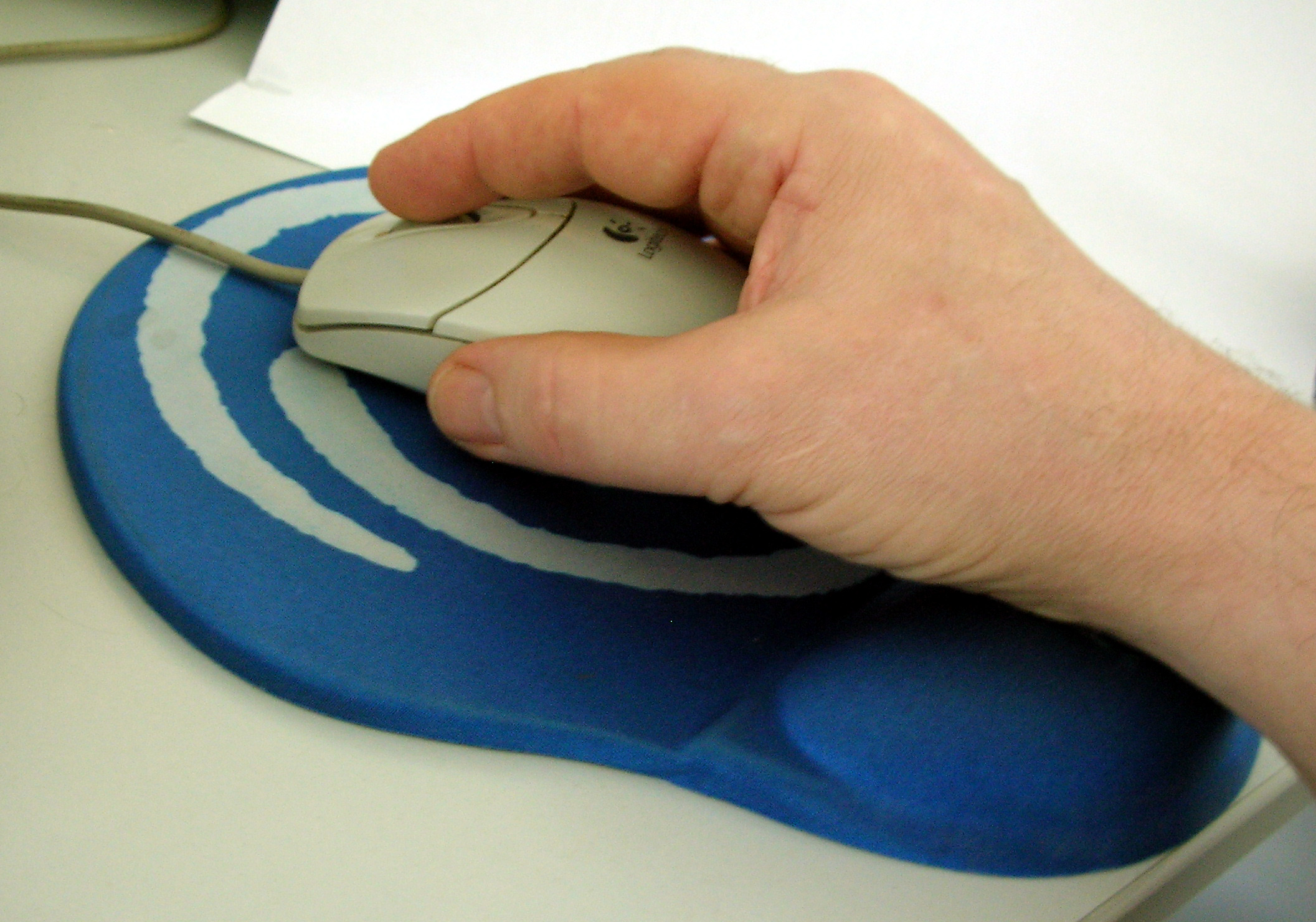 Ergonomisches Mauspad mit Handauflage. Ausgangsbild zur Veranschaulichung der Farbrekonstruktion